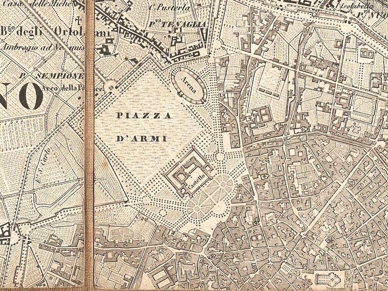 Carta di Milano, Giovanni Brenna (1865), dettaglio della piazza d'armi